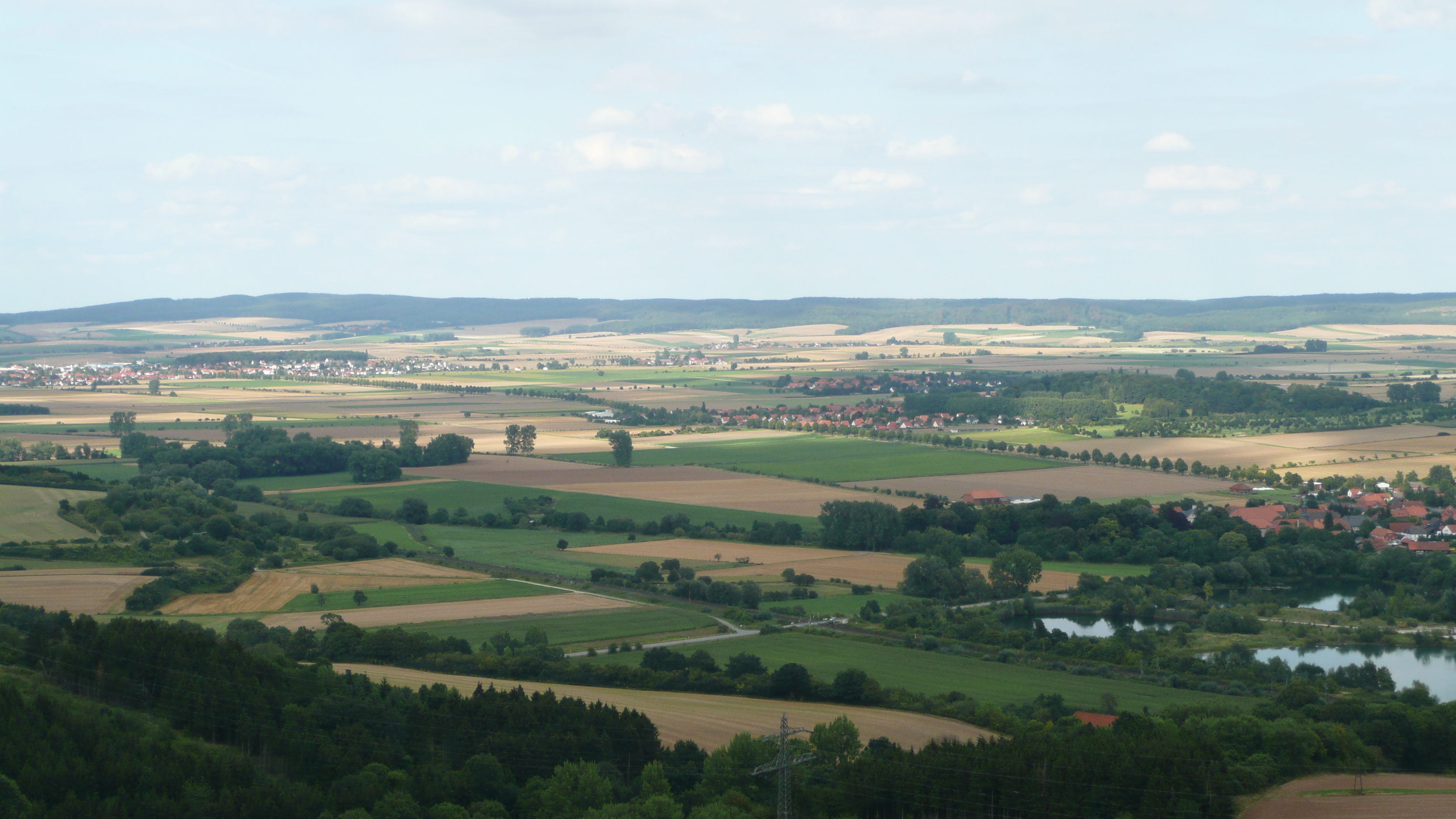 Panoramablick Hildesheimerwald